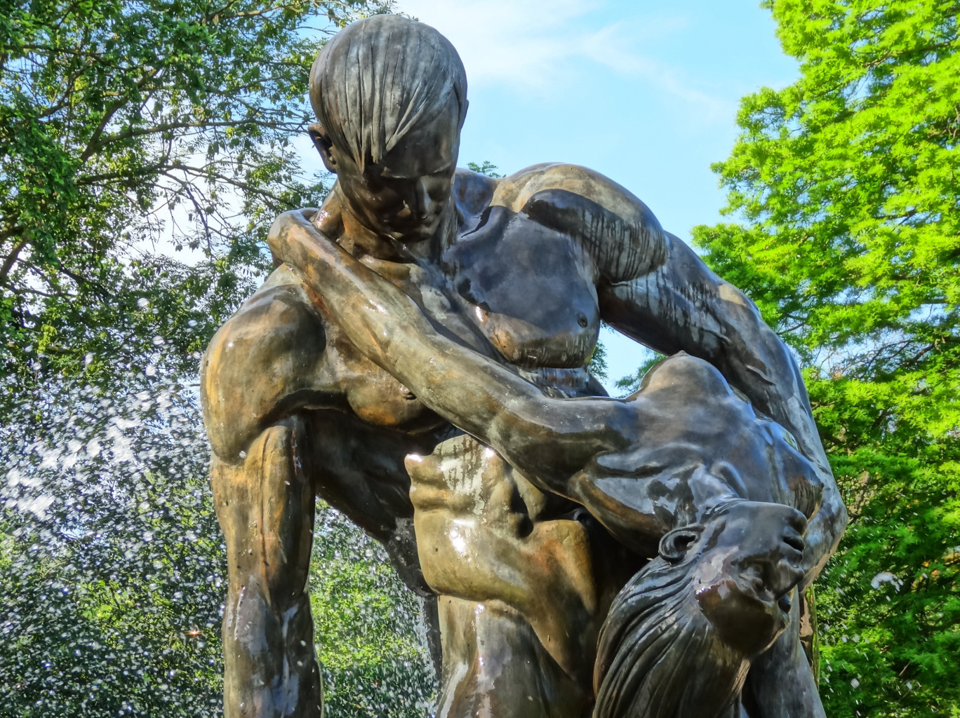 Fontanna Potop w Bydgoszczy rekonstruowana od 2006 roku. Fragment przedstawiajacy mężczyznę ratującego kobietę